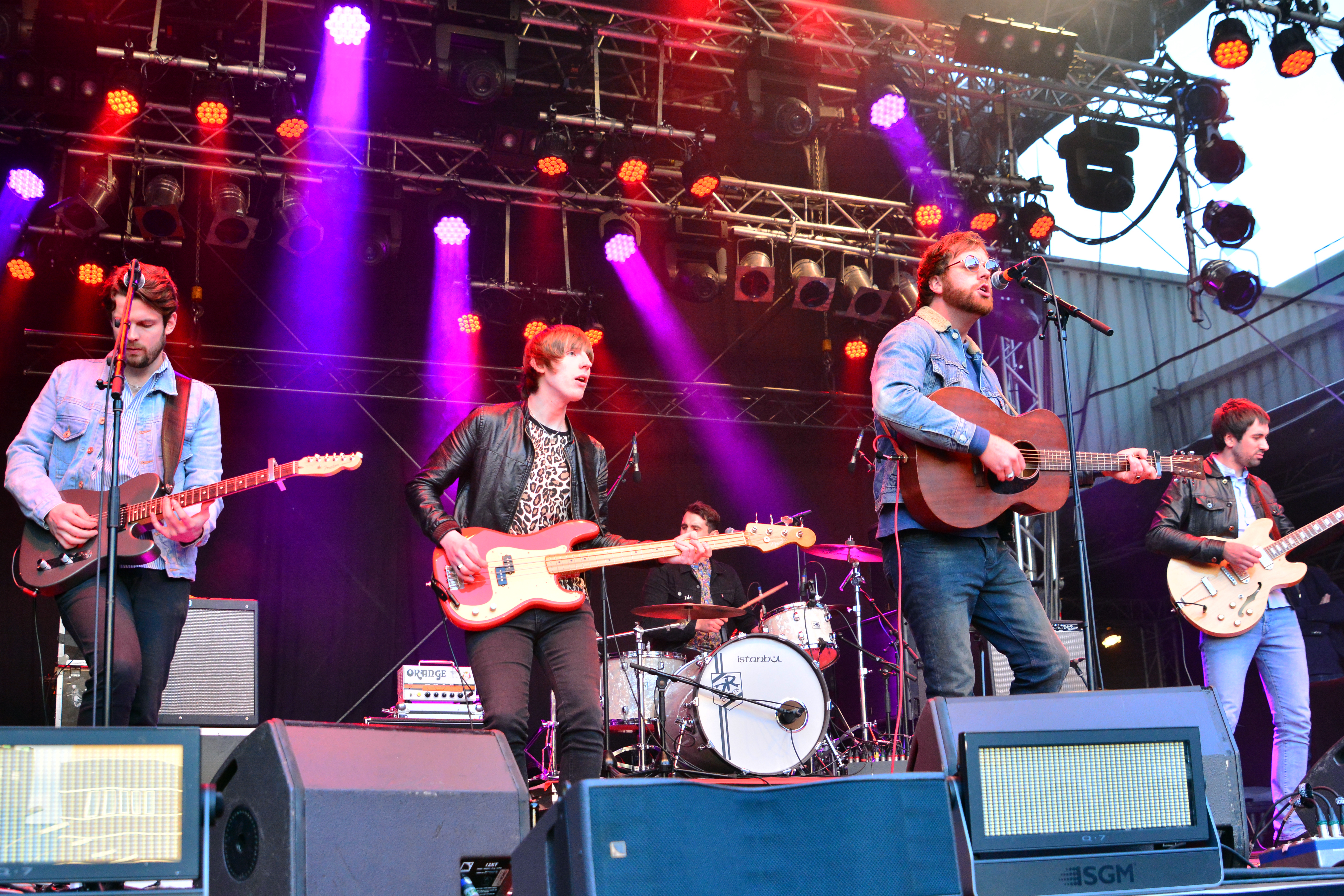 Young Rebel Set beim „Holsten Brauereifest 2015“ in Hamburg